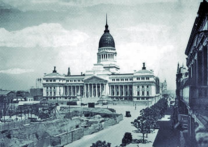 Finalización de las obras de la estación Congreso de la actual línea A de subte